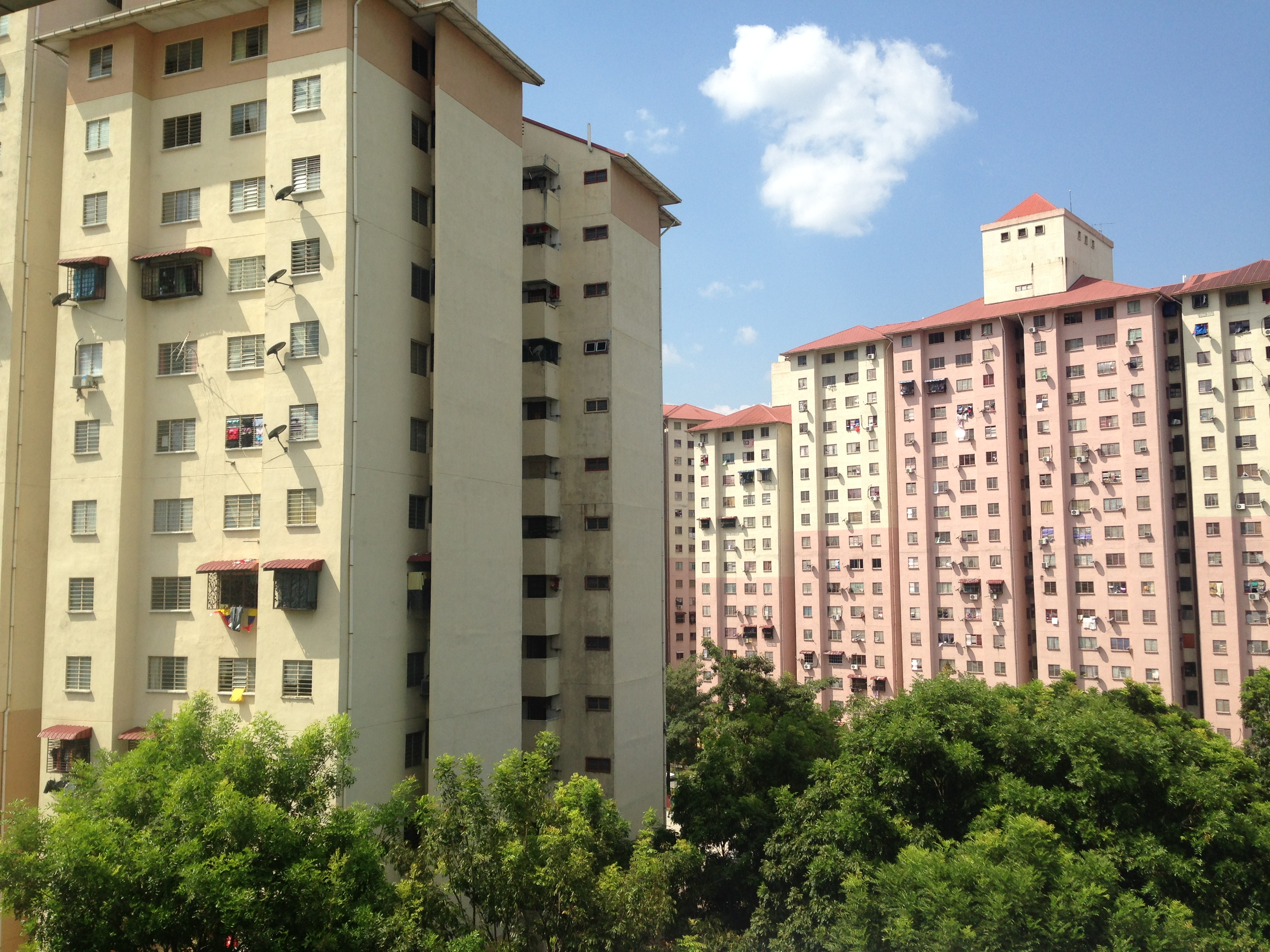 People"s Housing Project (Program Perumahan Rakyat or PPR) low cost high rise flats developed by the National Housing Department (Jabatan Perumahan Negara or JPN) in Kuala Lumpur since the 1998.